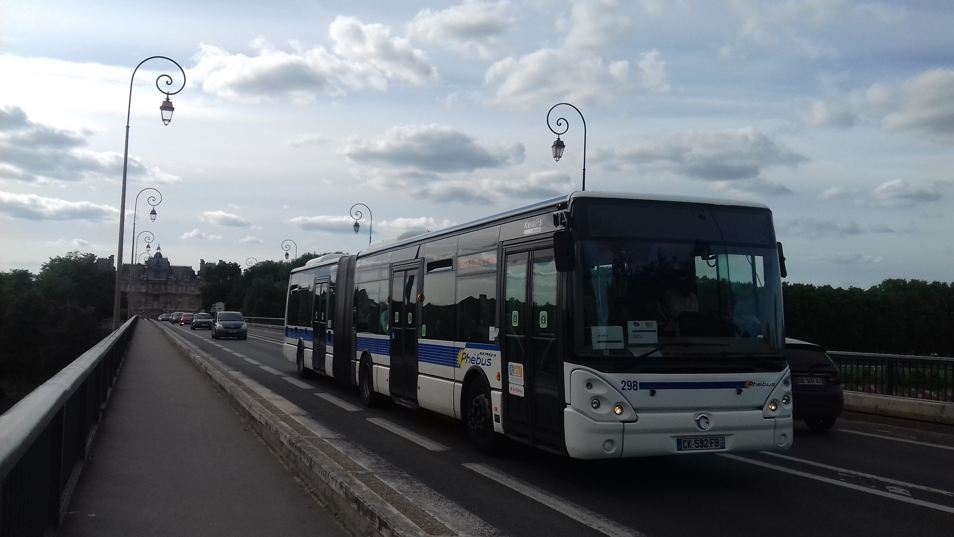 Irisbus Citelis 18 n°298 du réseau de Versailles à Maison Lafitte, substitution SNCF.